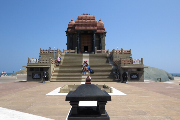 விவேகானந்தர் மண்டபம்